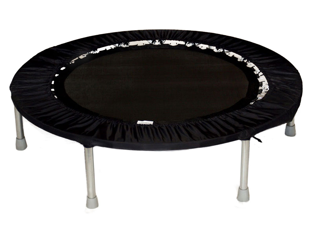 Needak Folding Rebounder